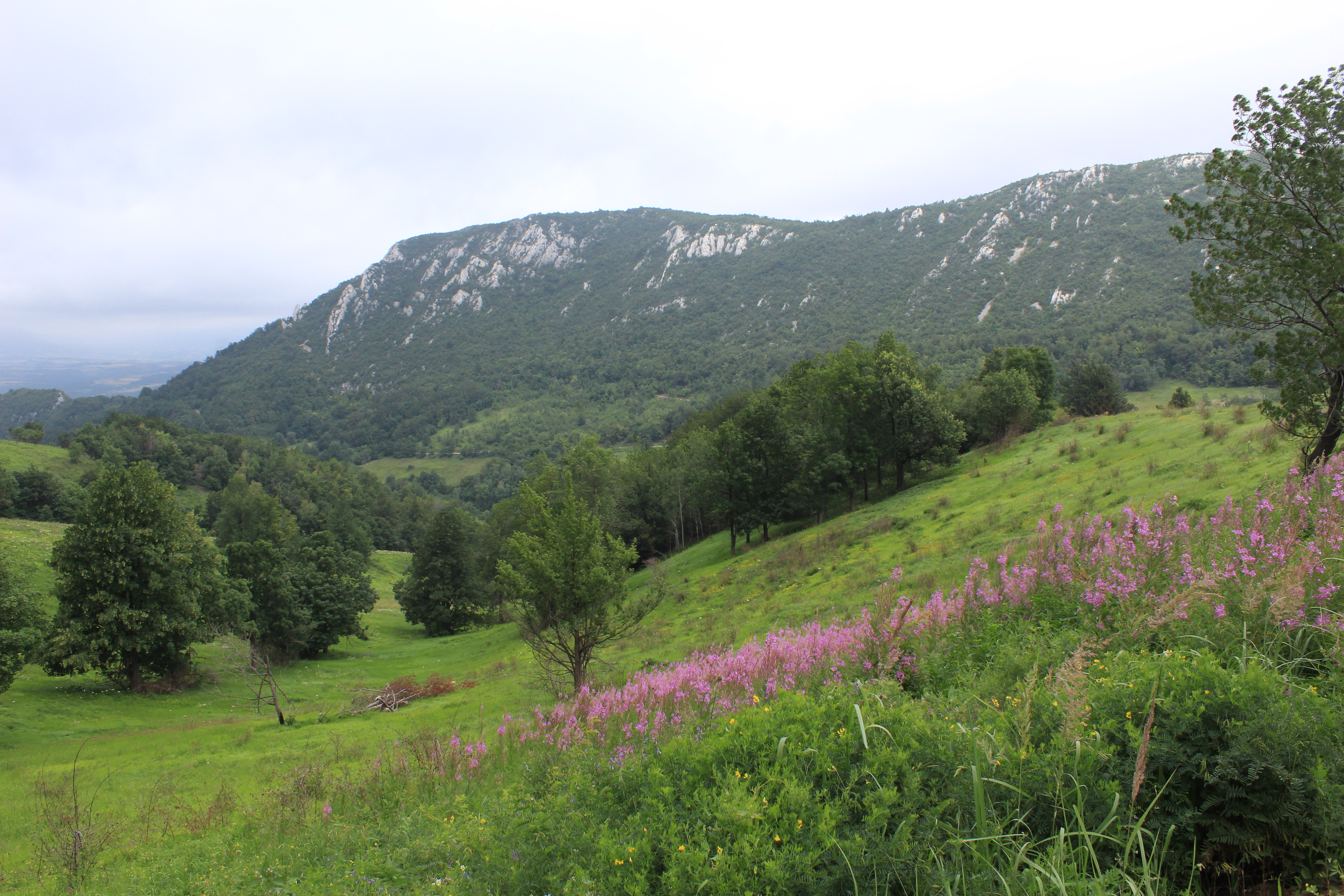 Srpski (latinica): Planina Borski stol.